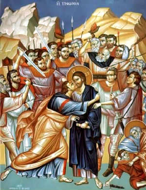 Јуда приђе Исусу, и пољуби га, јер то беше знак који раније договори са слугама првосвештениковим, “кога пољубим,тај је; држите га.” (Матеј 26;48).